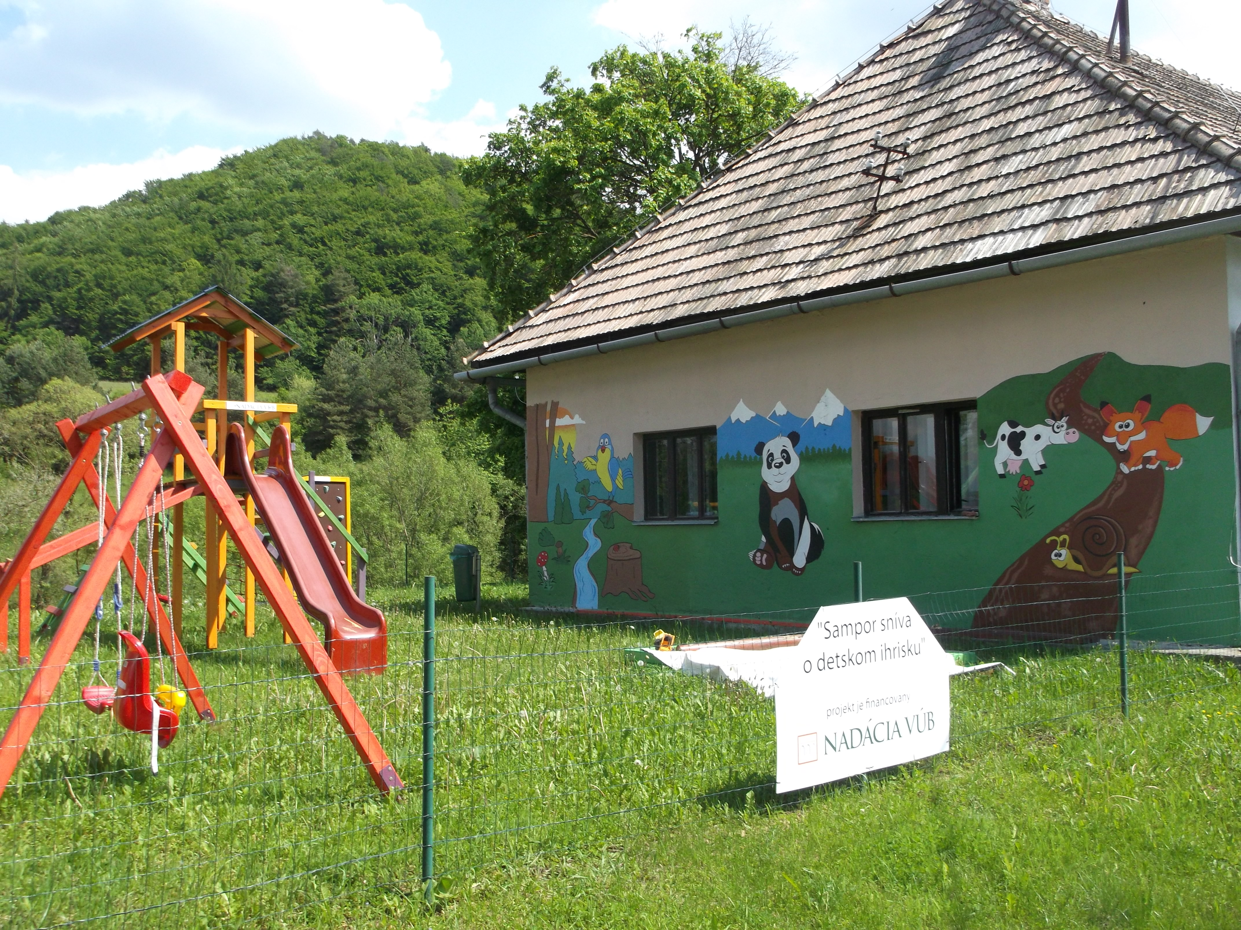 Detské ihrisko v Sampore